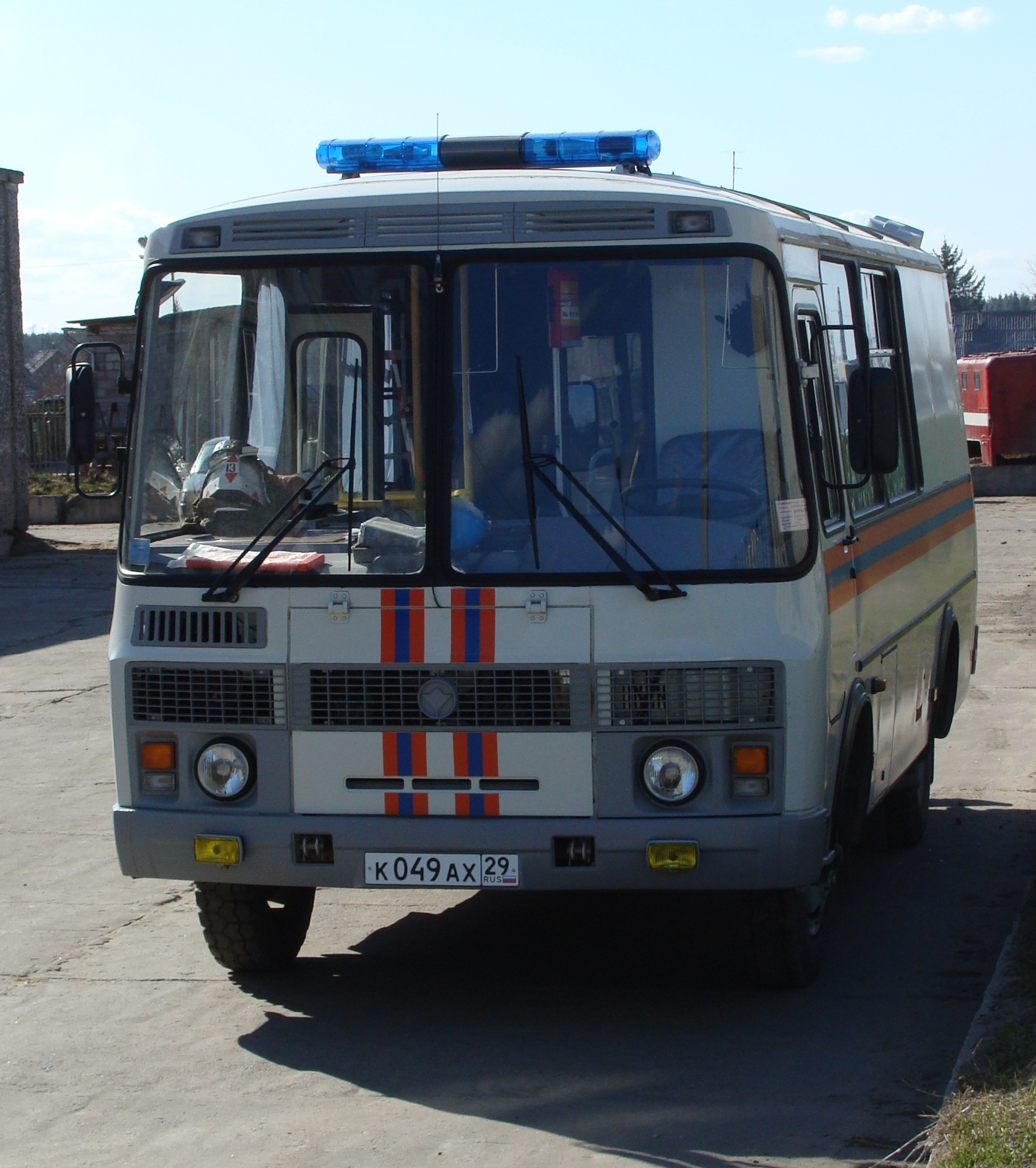 Газоспасательный автобус ПАЗ. Производитель Автоспектр MOBICOM